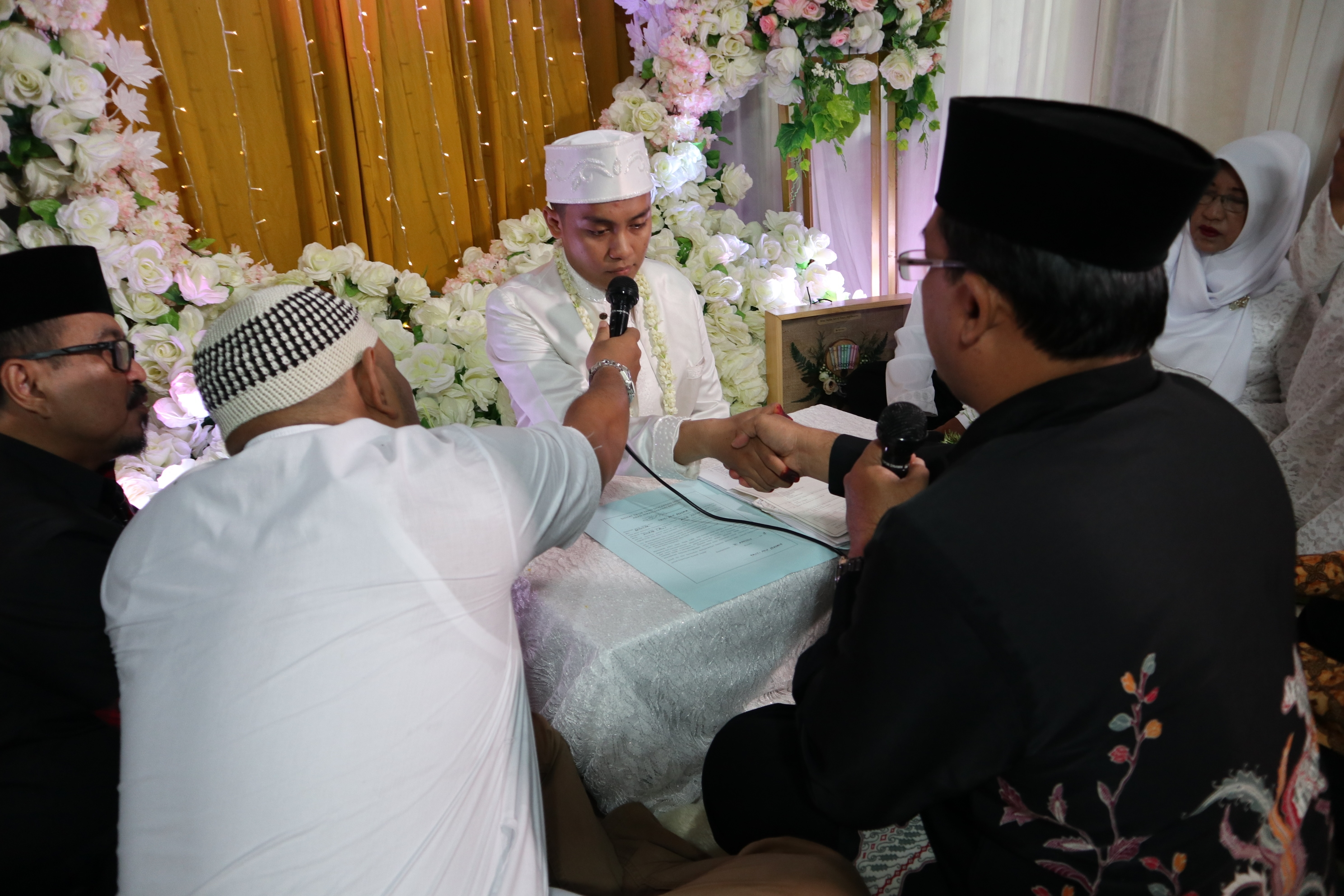 Prosesi ijab kabul. Ijab kabul adalah ucapan dari orang tua atau wali mempelai wanita untuk menikahkan putrinya kepada sang calon mempelai pria agar sebuah pernikahan pasangan Muslim dapat sah.